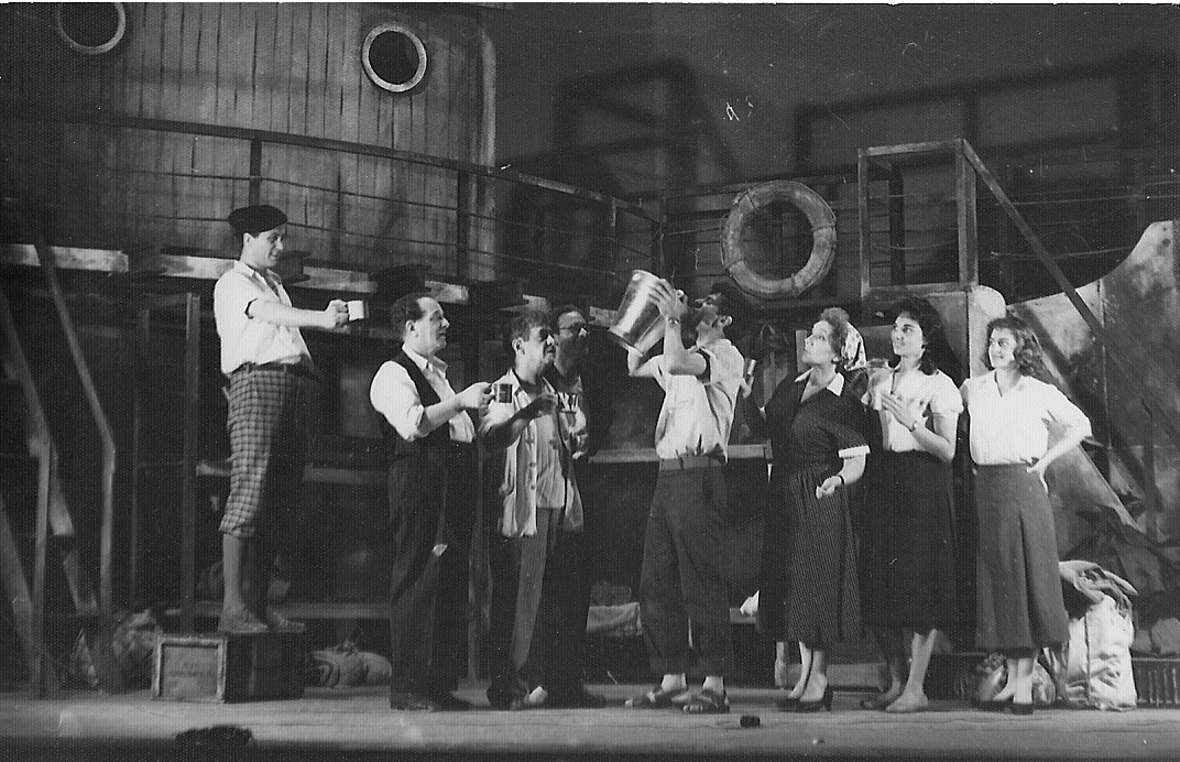 ההצגה "פורצי ההסגר" ב"אוהל" מניה הלוי